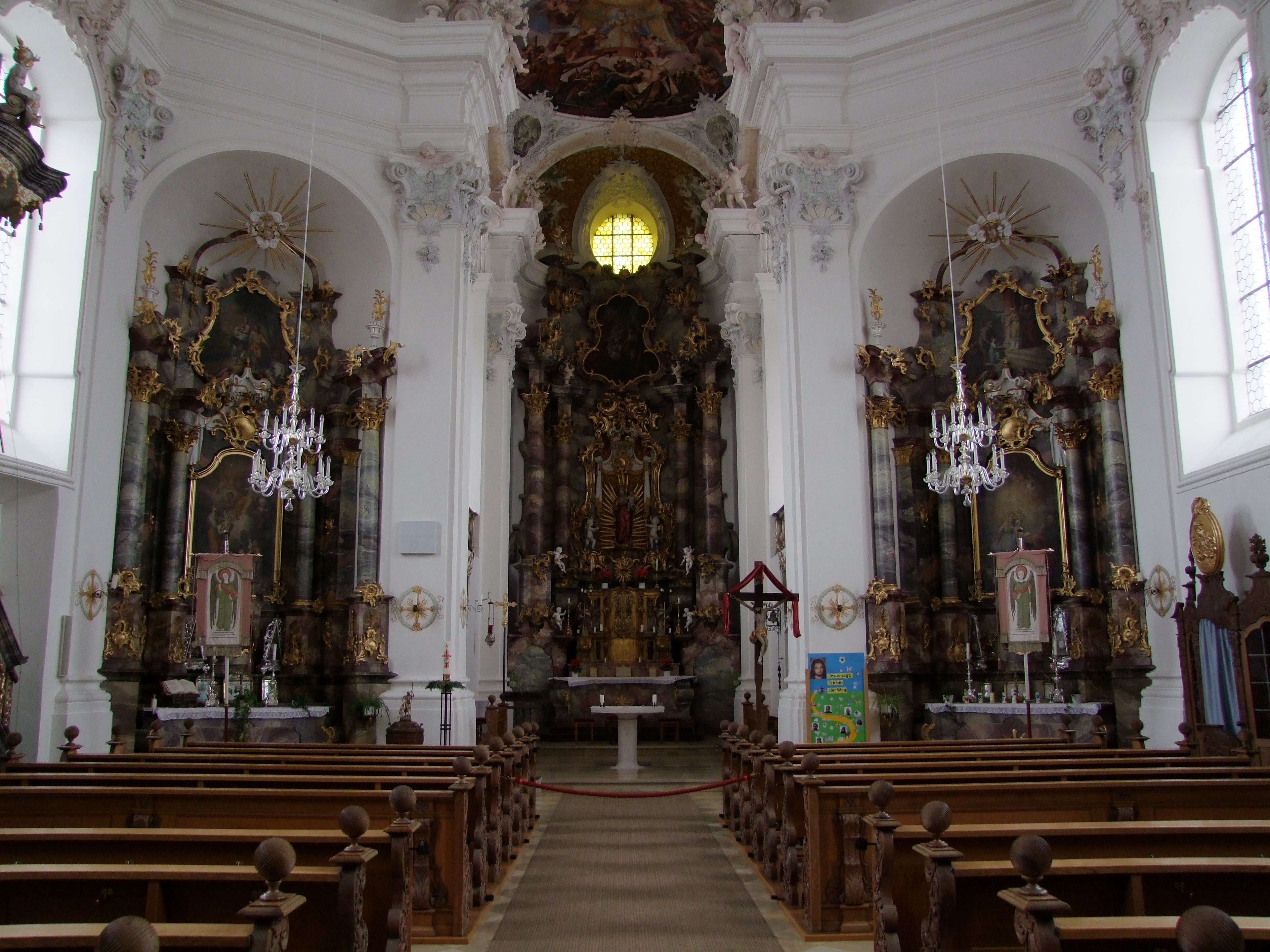 Mariä Geburt im oberschwäbischen Witzighausen, einem Ortsteil der Stadt Senden in Bayern.